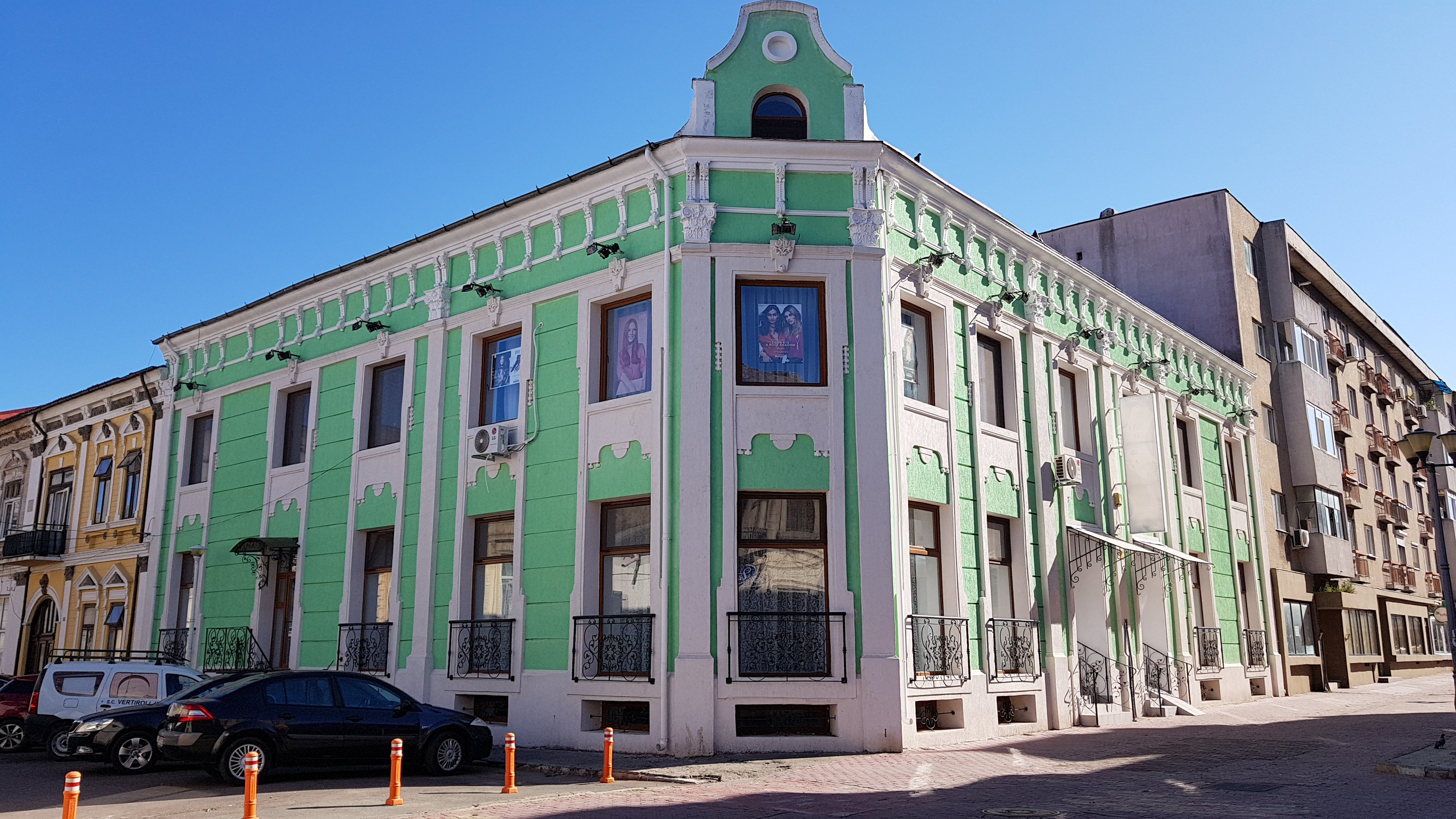 Sit urban